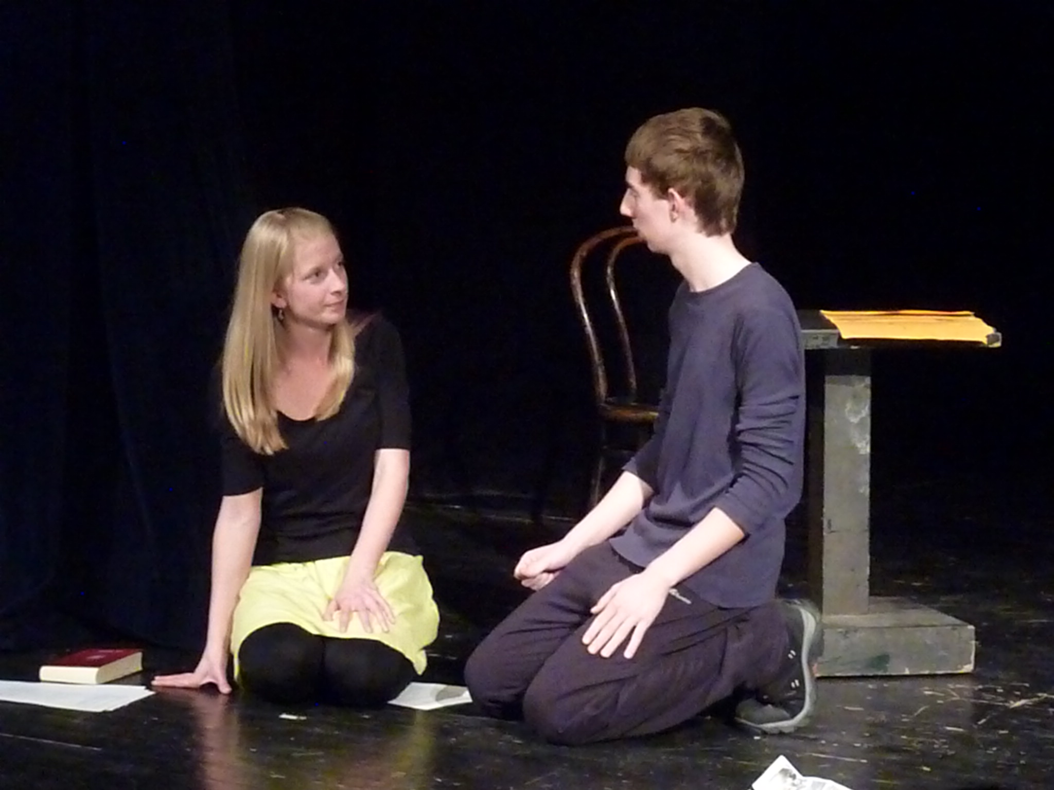 Adaptace překladu dramatu R. U. R. Karla Čapka do esperanta v podání divadla DOMA ze Svitav během dětského festivalu cizojazyčných divadel Festivadlo v Brně 23.03.2013.